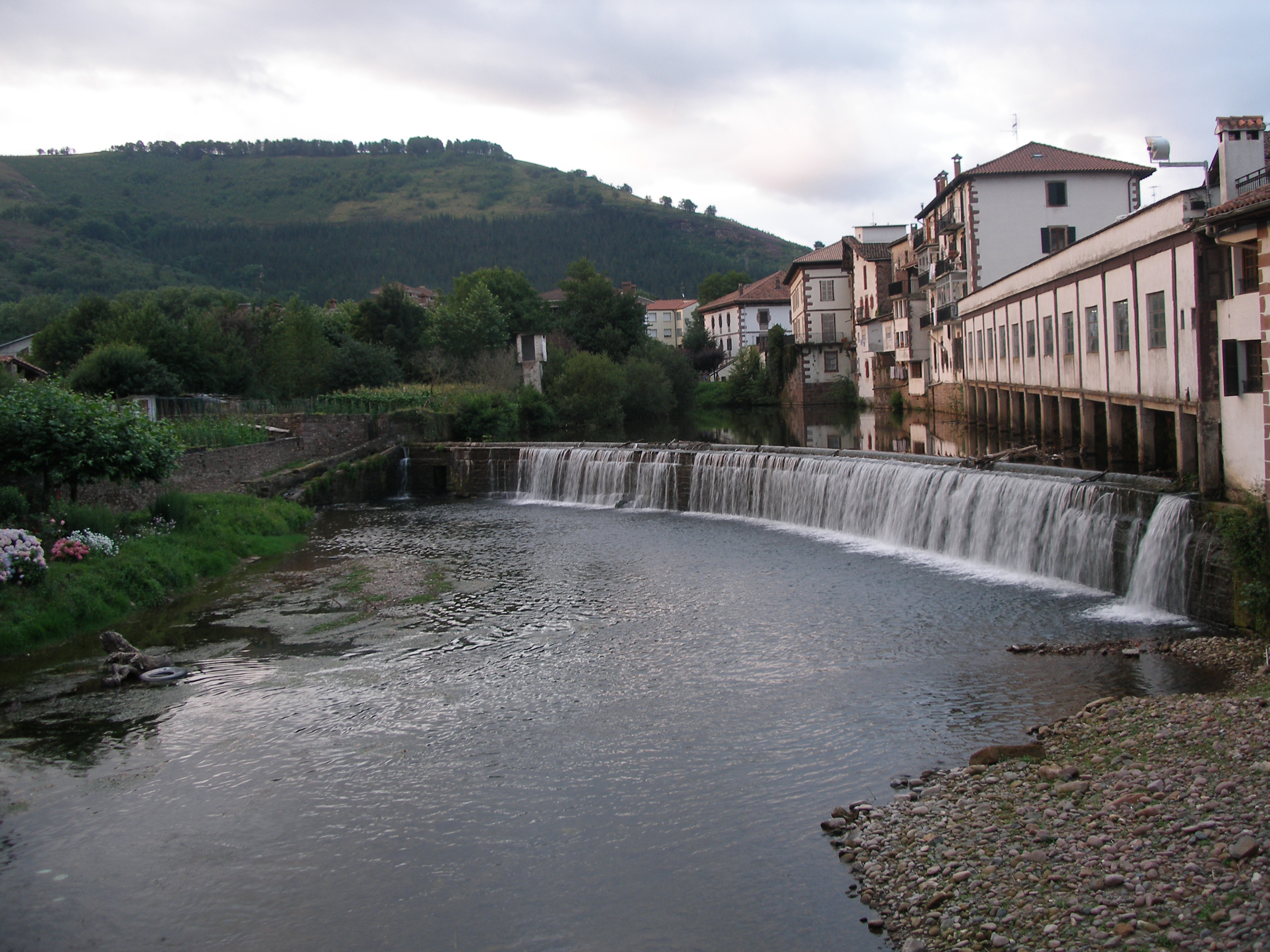 Elizondo